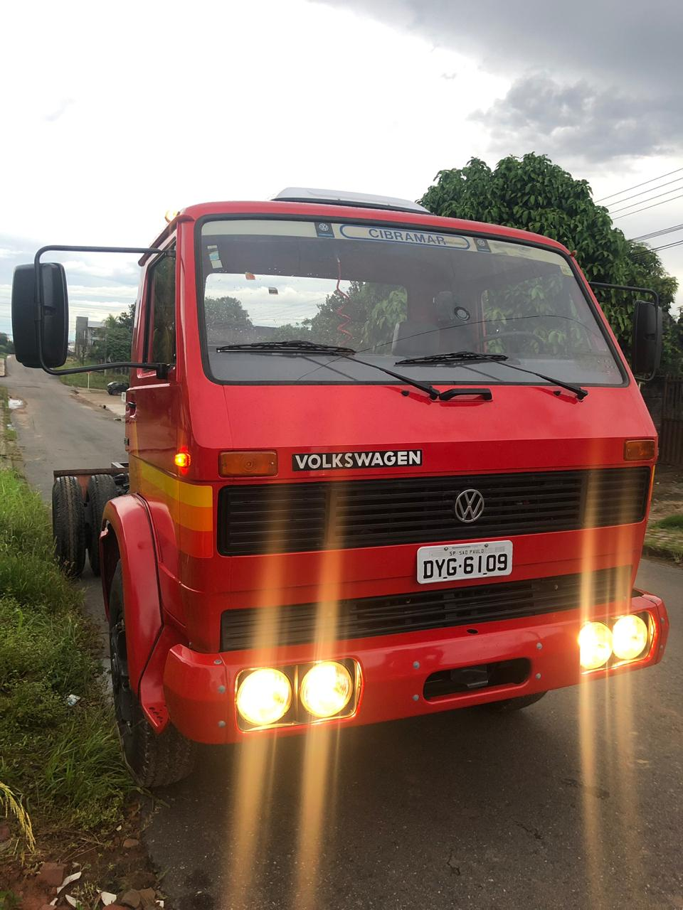 Caminhão zero km no ano de 2019, permaneceu guardado por 35 anos.